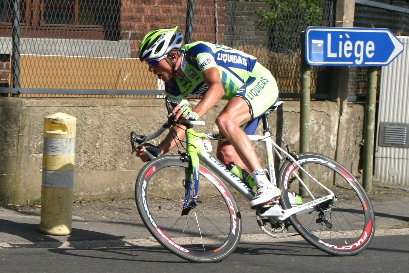 De Vladimir Miholjevic am Liège-Bastogne-Liège 2008 zu Boncelles.